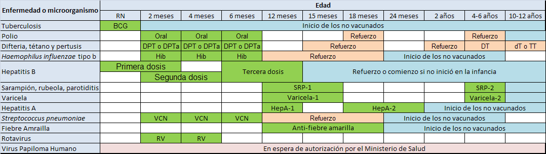 Esquema de vacunación venezolano.[1]